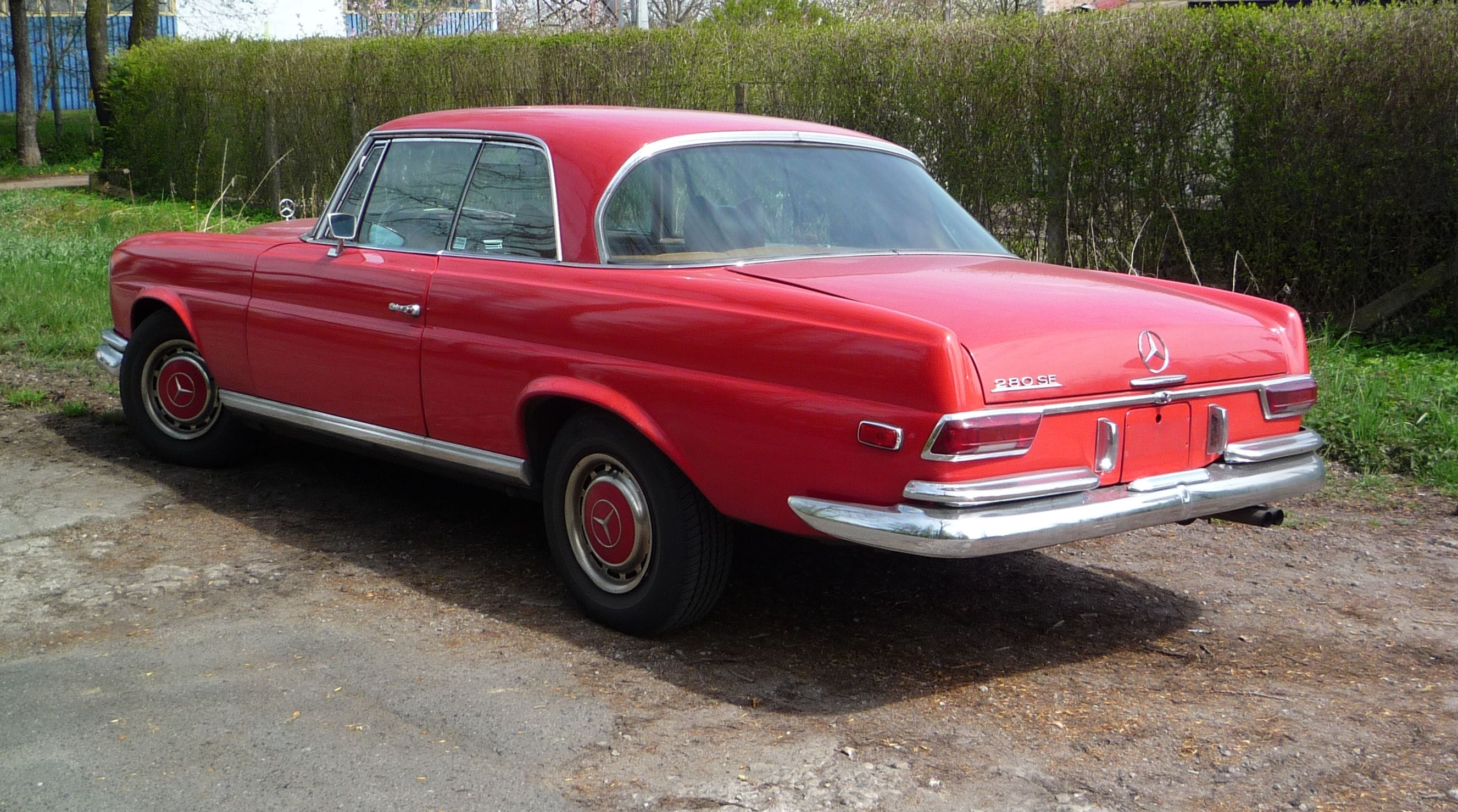 Mercedes-Benz W111C 280 SE w Słubicach.